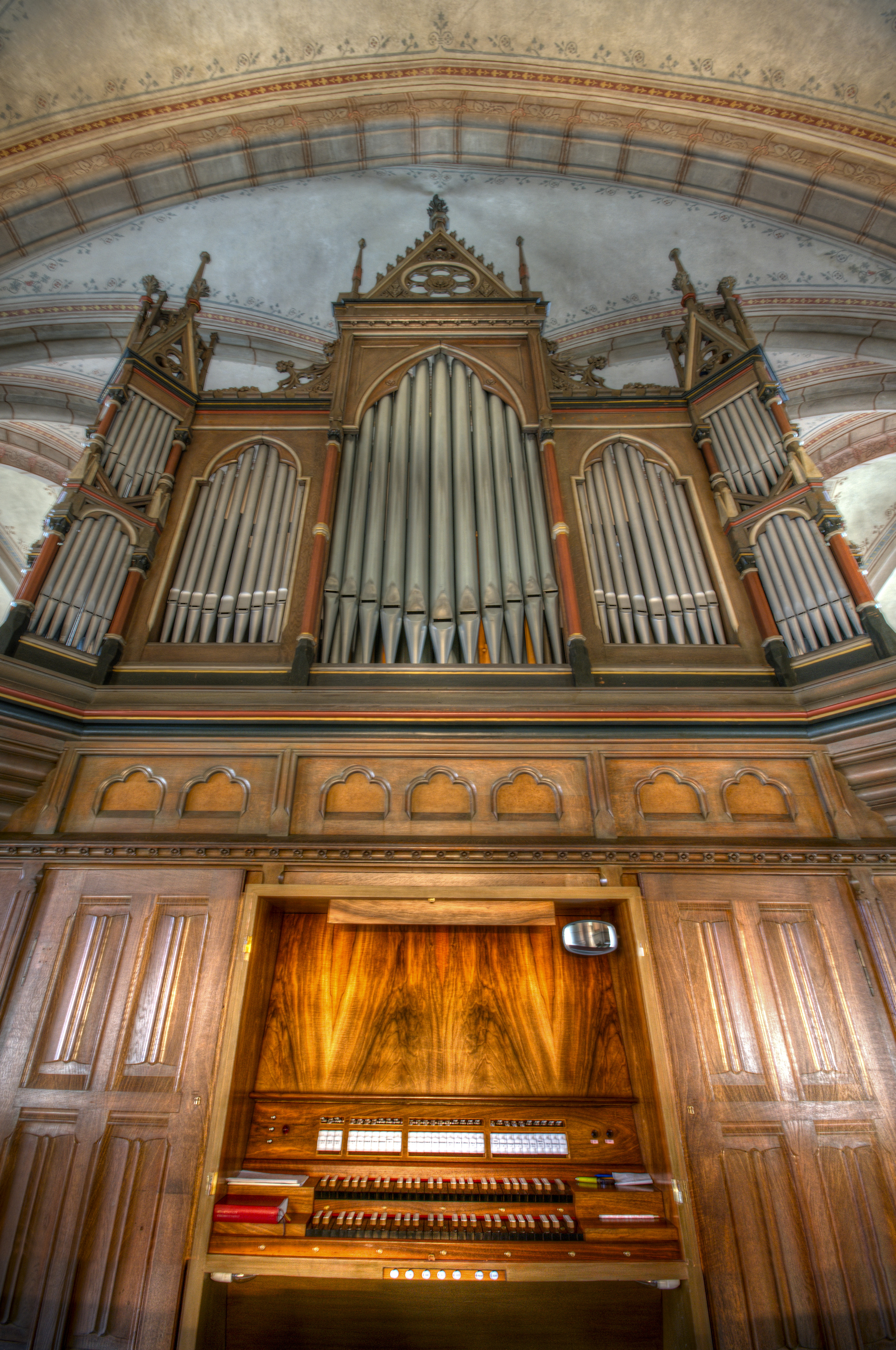 ev. Stadtkirche Wanfried, die Orgel frontal